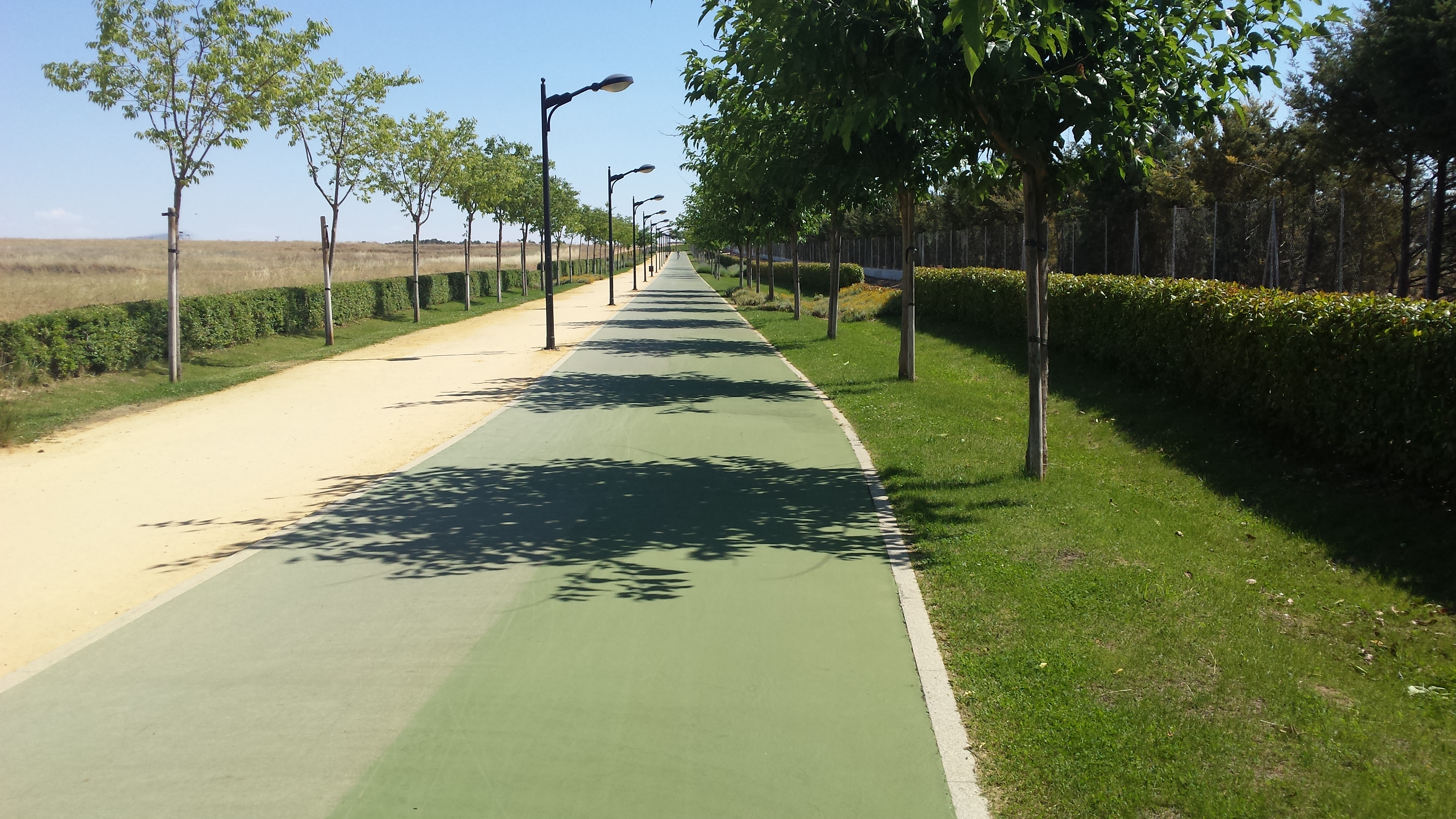 Vía verde de La Pulgosa. Albacete